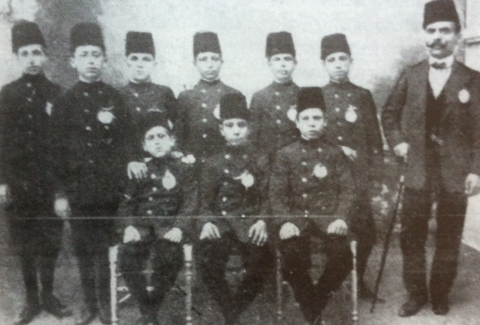 מכלוף נג'אר ולהקת התיאטרון שלו, צולם בסביבות שנת 1914, בסוסה, תוניסיה. עומדים משמאל לימין: פליקס ביז'אוי, ארנסט זוילי, בז'י אביטבול, כ'ליפה חורי, קלמנט כריאף, מכ'לוף נג'אר. יושבים משמאל לימין:ויקטור ביז'אוי, צ'רלס הטל, אלי אסוס.